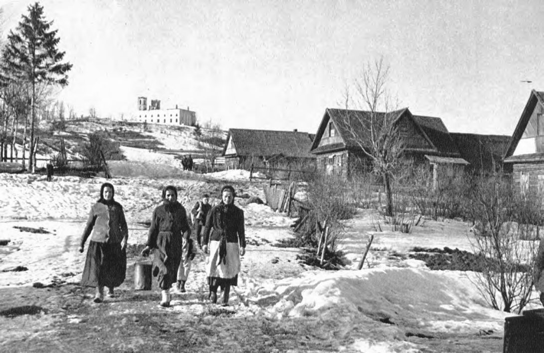 Кирха прихода Туутари на горе Кирхгоф. Вид из деревни Рётселя